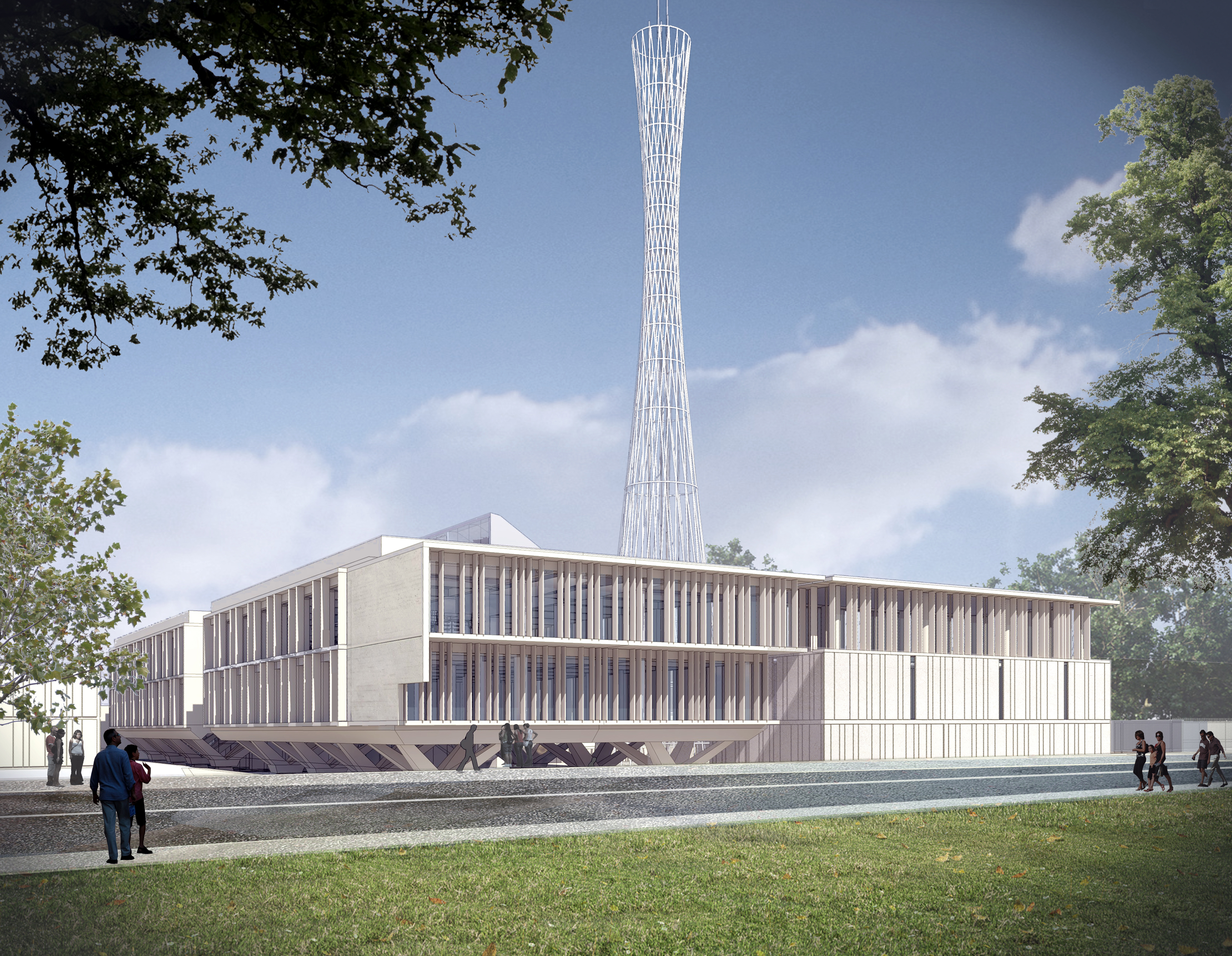 25-02-2013 Nuevo edificio institucional de la ONEMI